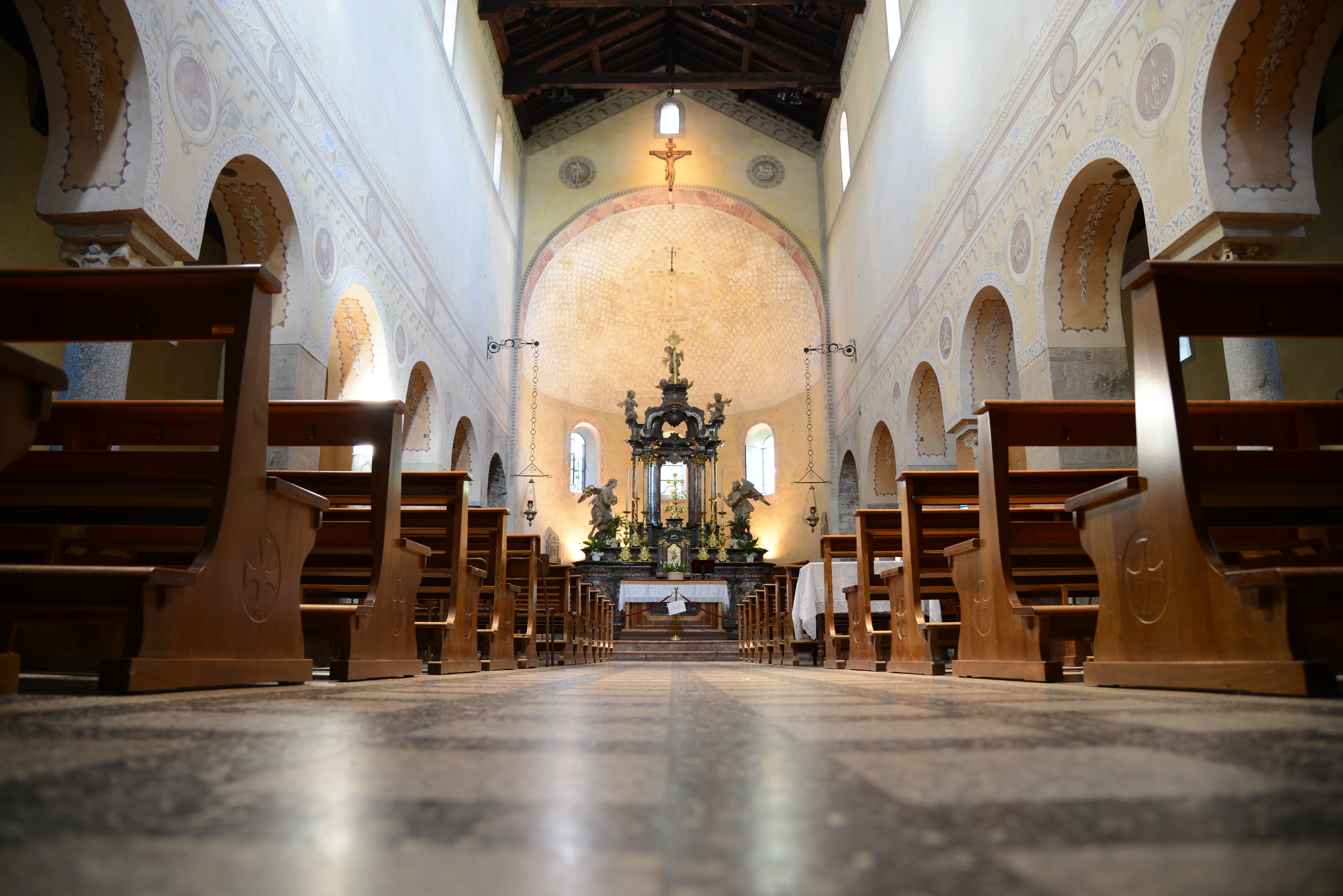 Basilica di San Vittore Martire This is a photo of a monument which is part of cultural heritage of Italy.